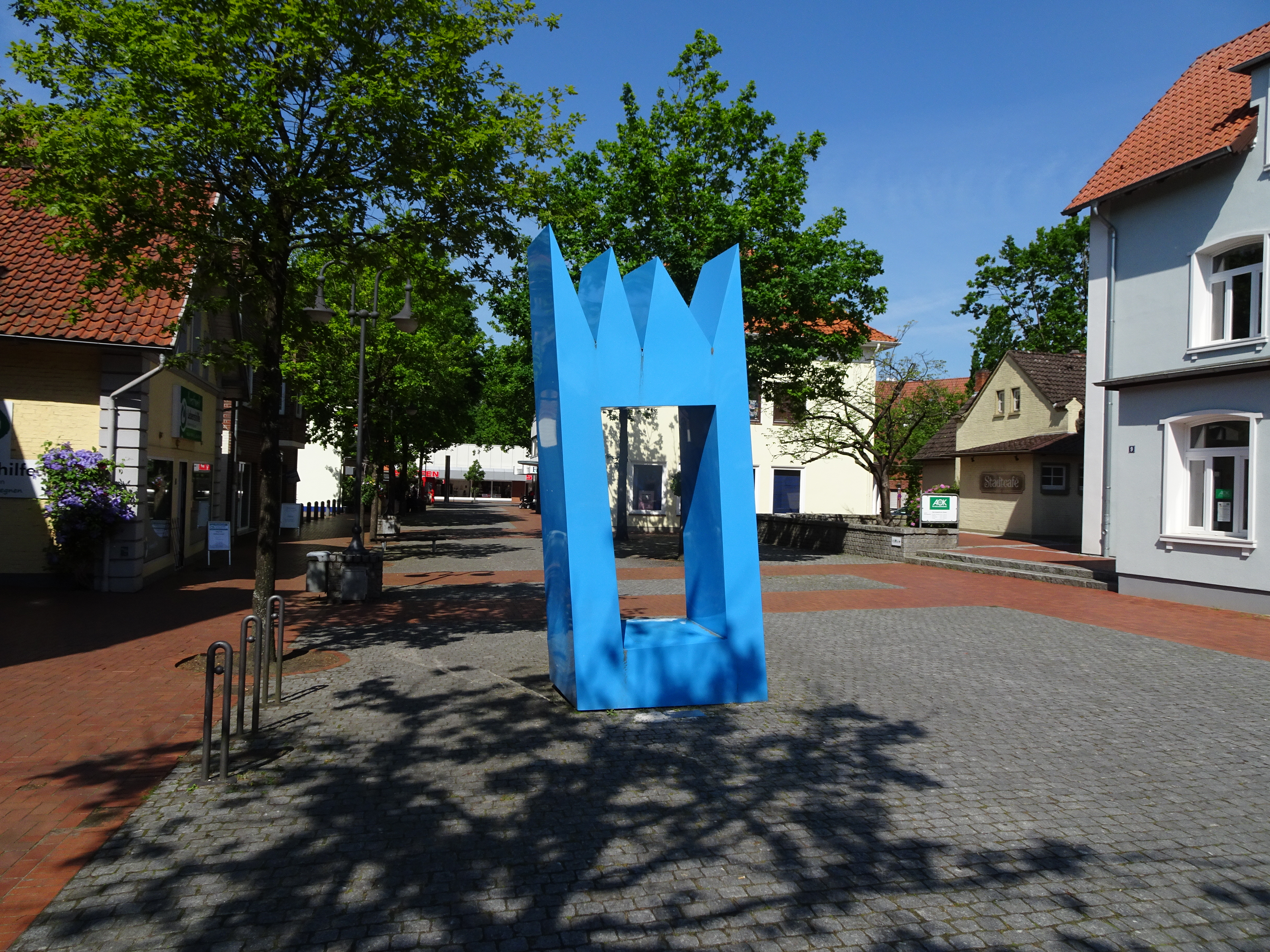 Skulptur "Krona" von Gunther Gerlach in Zeven, von 2001